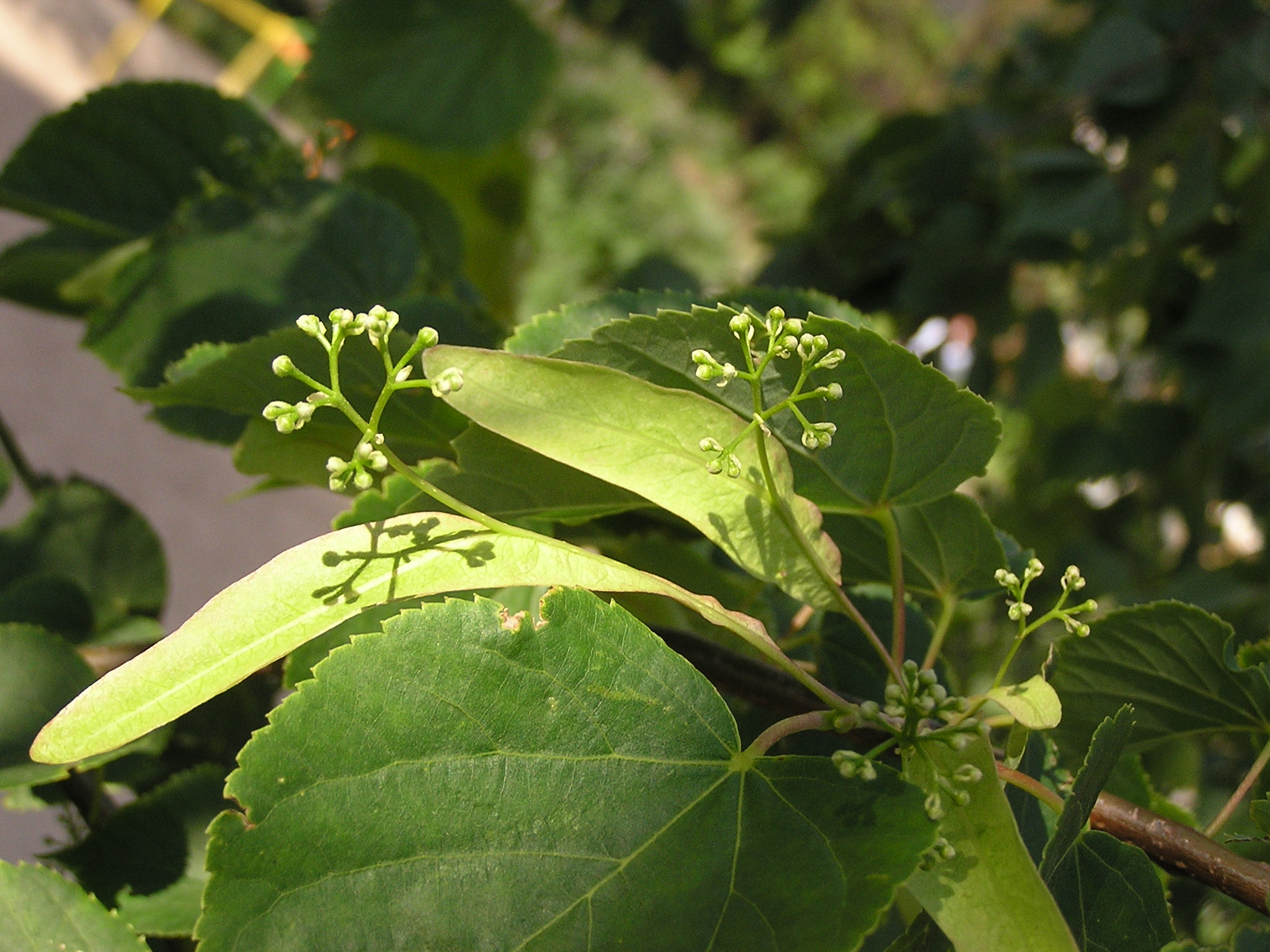 Липа мелколистная Tilia cordata